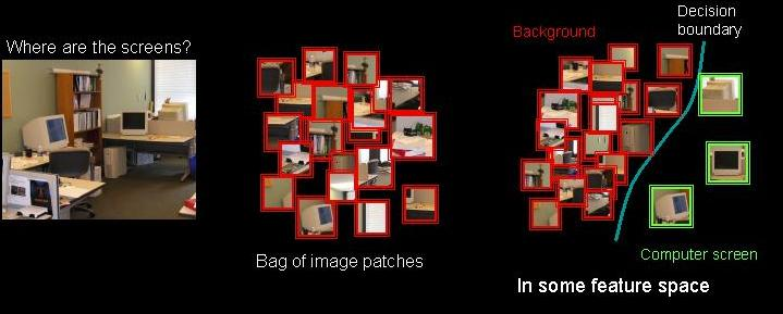 finestres